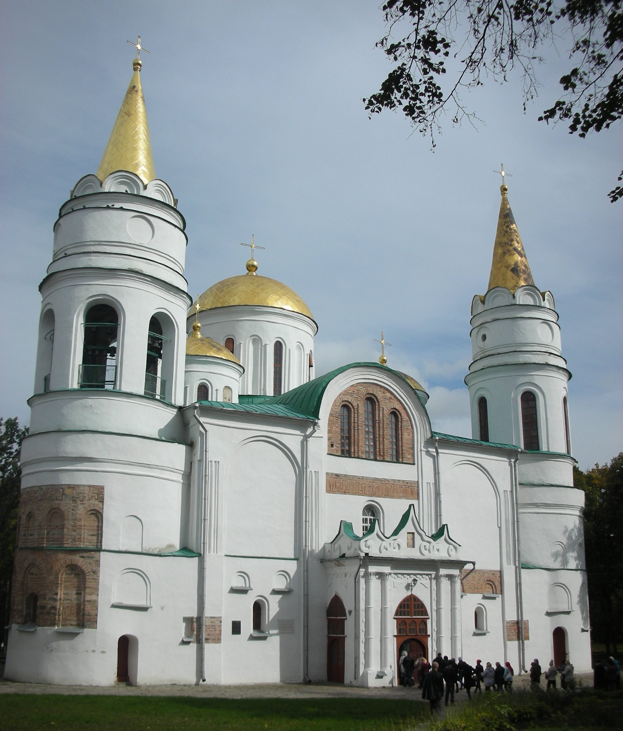 Спасо-Преображенський собор (мур.), Чернігів, Вал